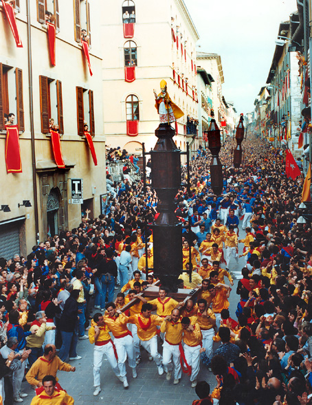 Gubbio (Perugia - Italy): La corsa dei Ceri